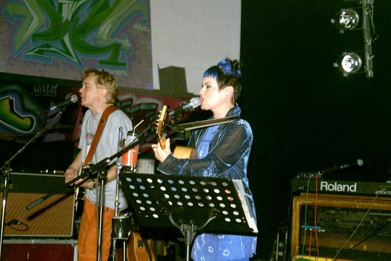 Ina Deter mit ihrem damaligen Lebensgefährten Manni Holländer bei einem Auftritt 2001 in Lingen